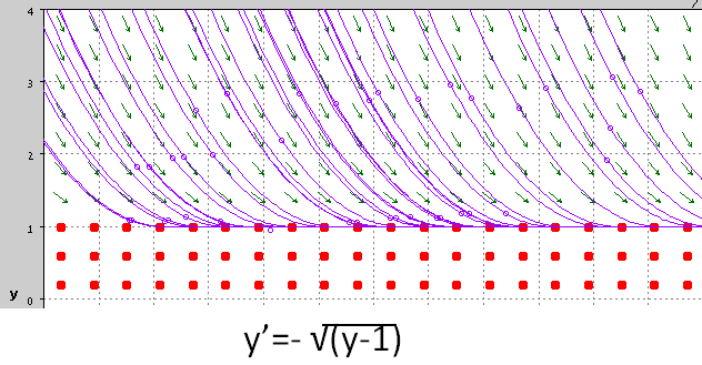 عائلة حلول في المعادلة المعطاه. اختيار شرط بدائي يعطينا حل واحد هو دالة